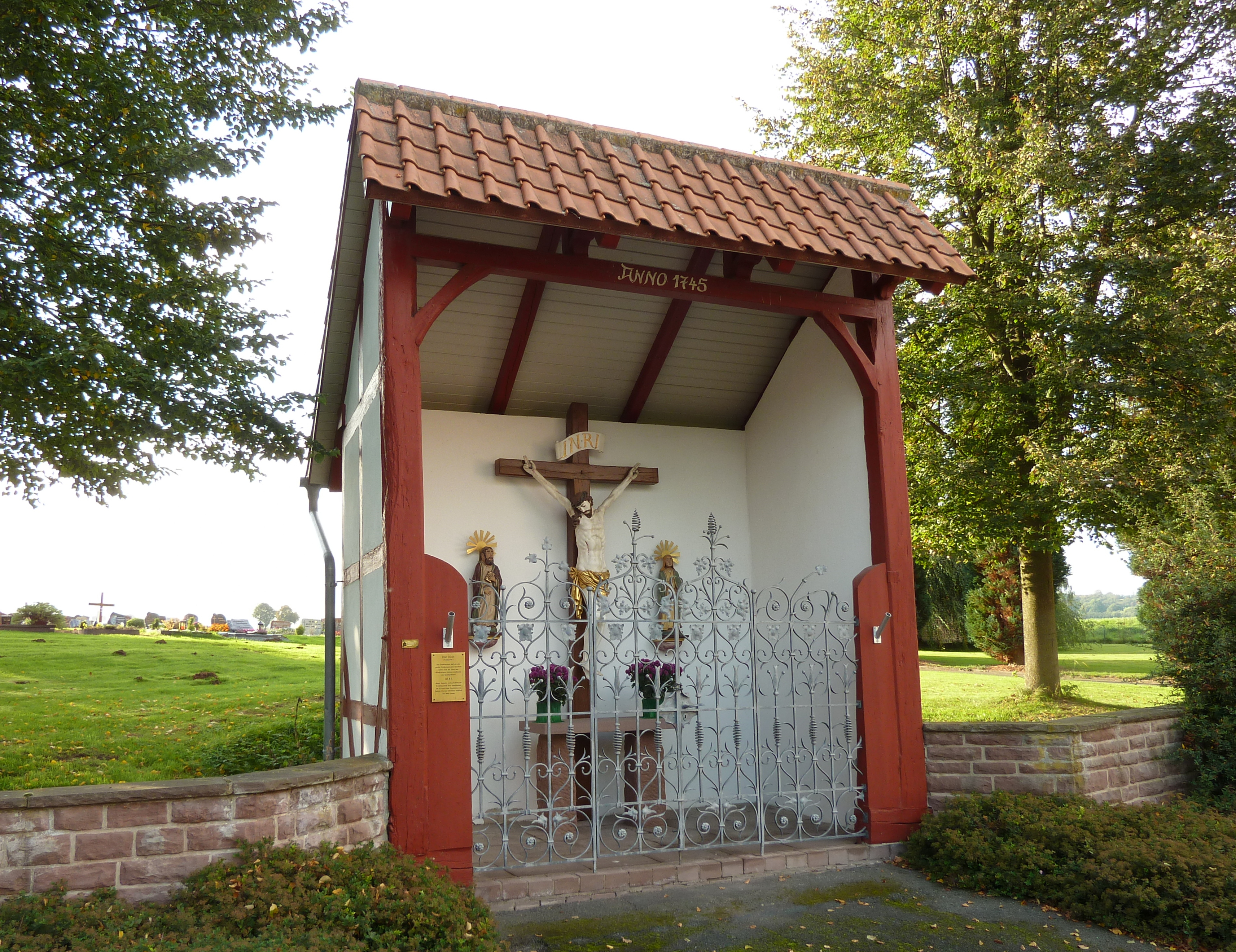 Die Klus in Immingerode, Stadt Duderstadt, südniedersächsisches Eichsfeld. Ursprünglich errichtet 1683 durch die Bewohner Immingerodes aus Dankbarkeit nach dem Überleben einer Pestepidemie, heutiger Bau lt. mit Inschrift "1745", nach Denkmaltopographie aus der 2. Hälfte des 19. Jahrhunderts